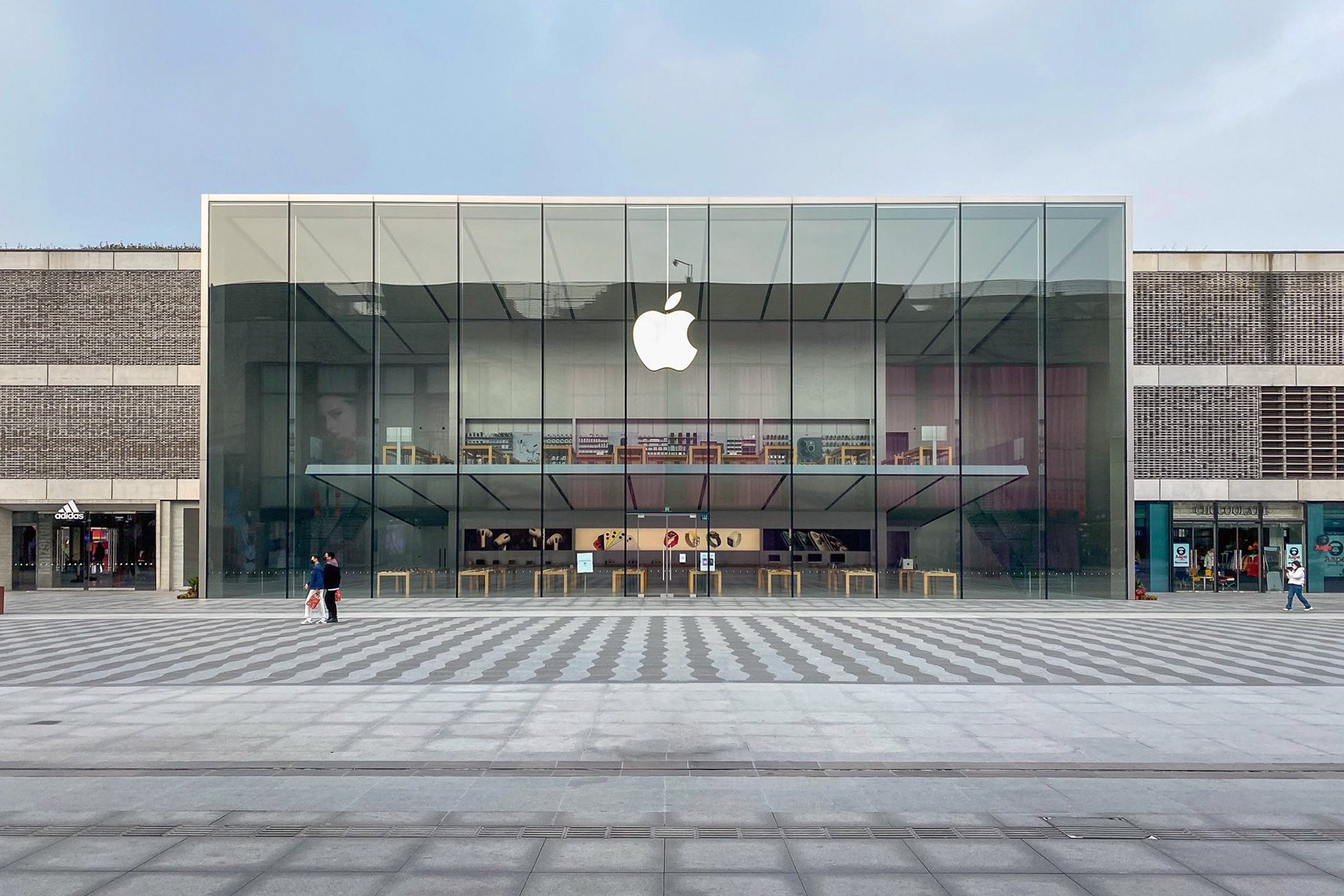 Apple West Lake Feburary 2020 Original.jpg 的衍生作品，已获得衍生作品著作人 Filip 授权。